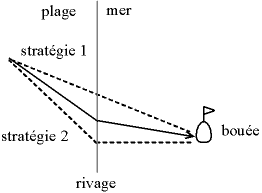 Réfraction : métaphore des athlètes Un athlète doit partir de la plage et rejoindre une bouée dans l'eau. Il essaie deux stratégies : aller en ligne droite : courir à l'aplomb de la boué, et nager perpendiculairement au rivage. C'est la stratégie 2 qui est la plus rapide, car il nage plus lentement qu'il ne coure. Mais la stratégie optimale consiste à suivre la loi de Snell-Descartes (trajectoire en trait plein). Auteur : Christophe Dang Ngoc Chan, réalisé avec un programme de dessin vectoriel Licence GFDL Christophe Dang Ngoc Chan